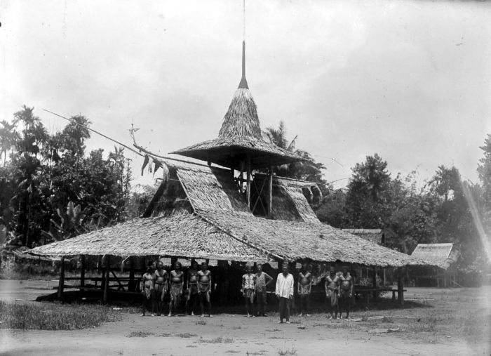 Negatief. Kau (vroeger meestal gespeld als Kaoe, aan de Kaoebaai) ligt op de oostkust van de 'noordarm' van Halmahera tegenover Djailolo, dat op de westkust ligt. Het viel onder de Sultan van Ternate. Het was een van de weinige gebieden op het eiland die in de 19e eeuw nog iets anders produceerde dan sago, kokosnoten, rijst, tabak, damar en hout, namelijk parels en parelmoerschelpen. Rond 1900 waren de parelbanken echter uitgeput. In de vroege 20e eeuw was een groot deel van de bevolking van Halmahera 'heiden' en de meeste dorpen hadden een soort dorpstempeltje (of wellicht eerder een dodenhuisje), waar de sjamaan de dodenrituelen uitvoerde. (P. Boomgaard, 2001). Een aantal mannen staan voor een dorpstempel te Toegoeis, Halmahera